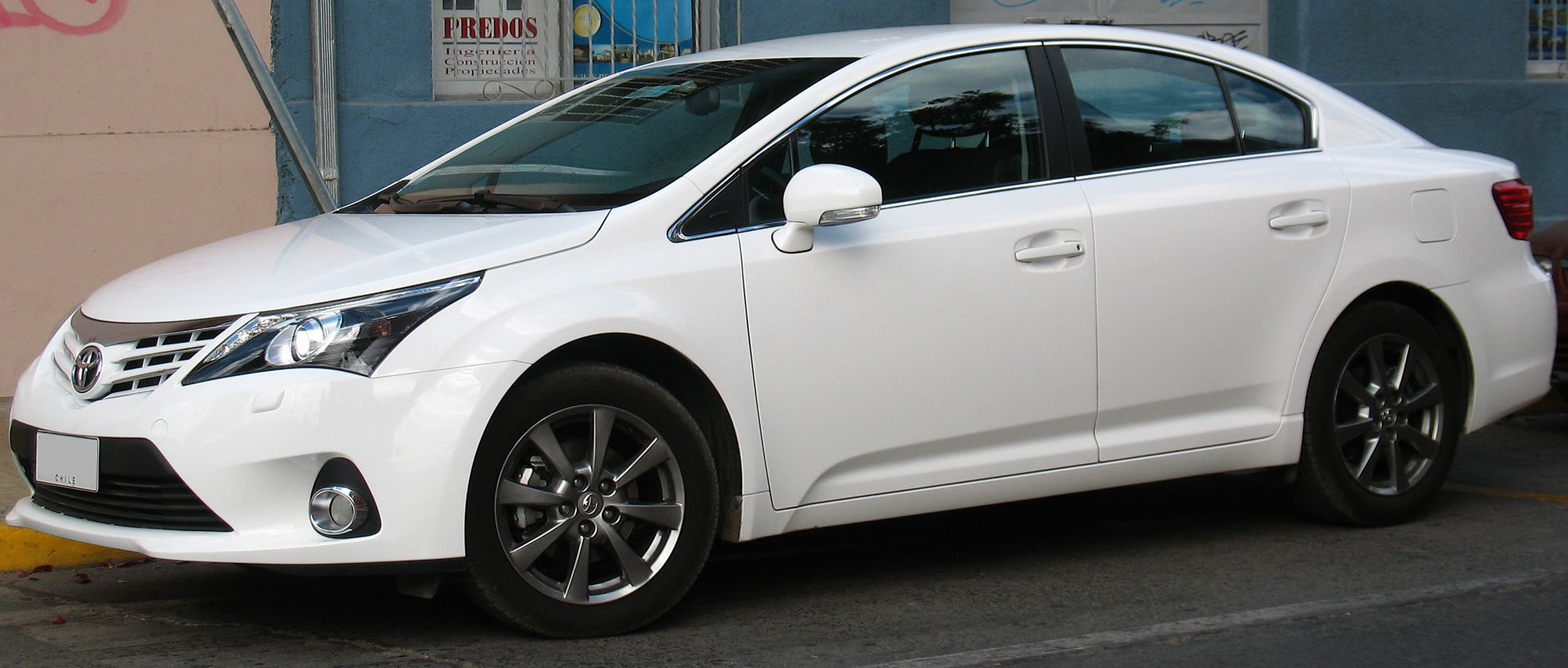 Toyota Avensis 2.0 GLi 2013